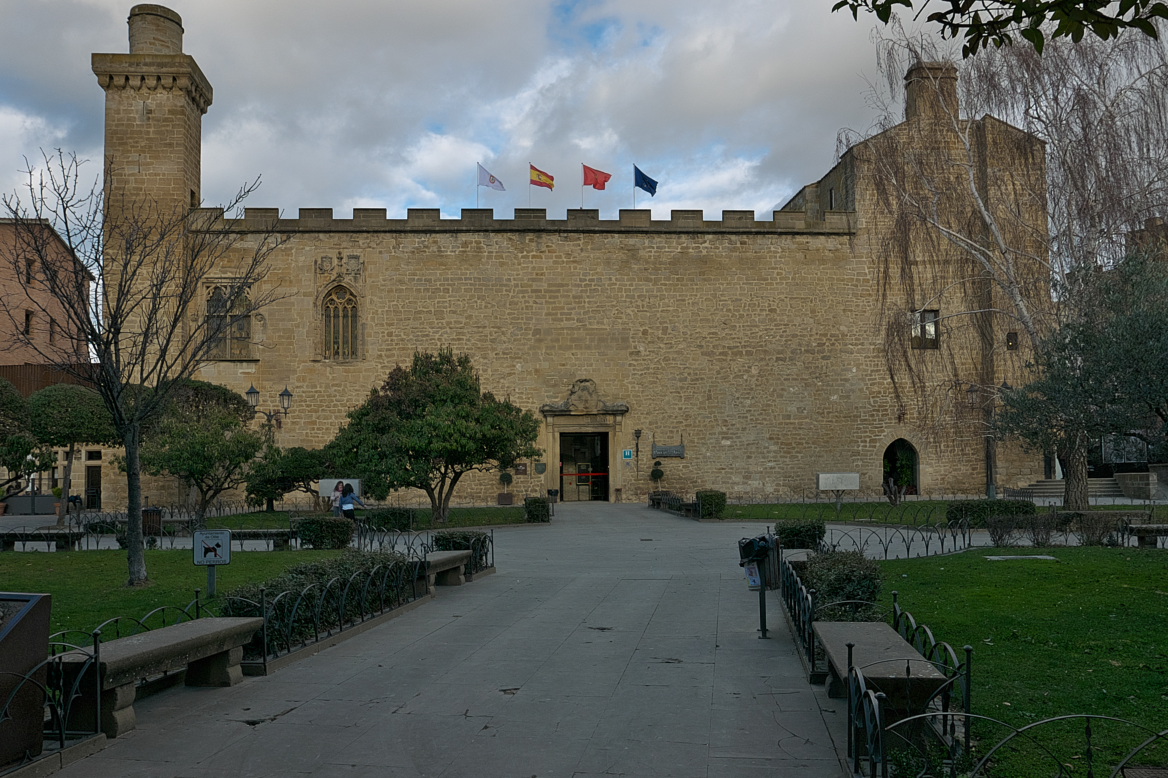 Desde el siglo XIII residencia real en Olite.